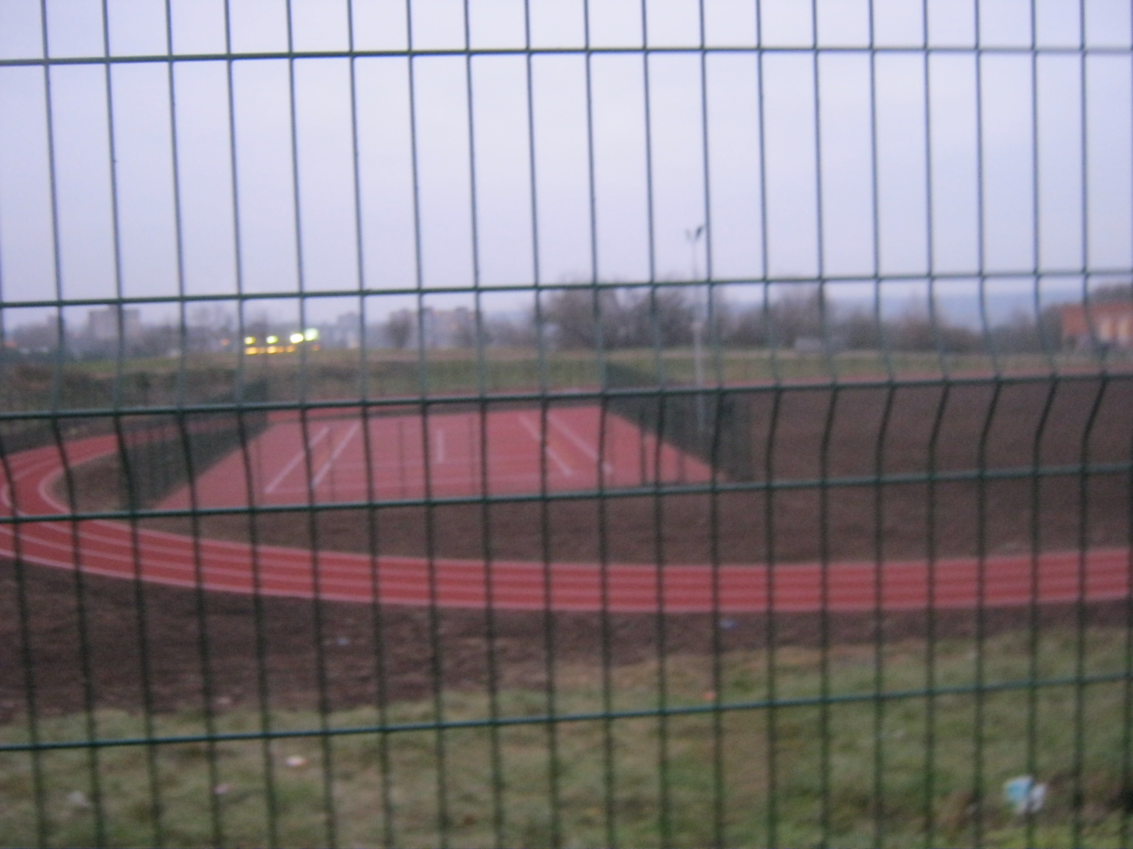 Naujas stadionas